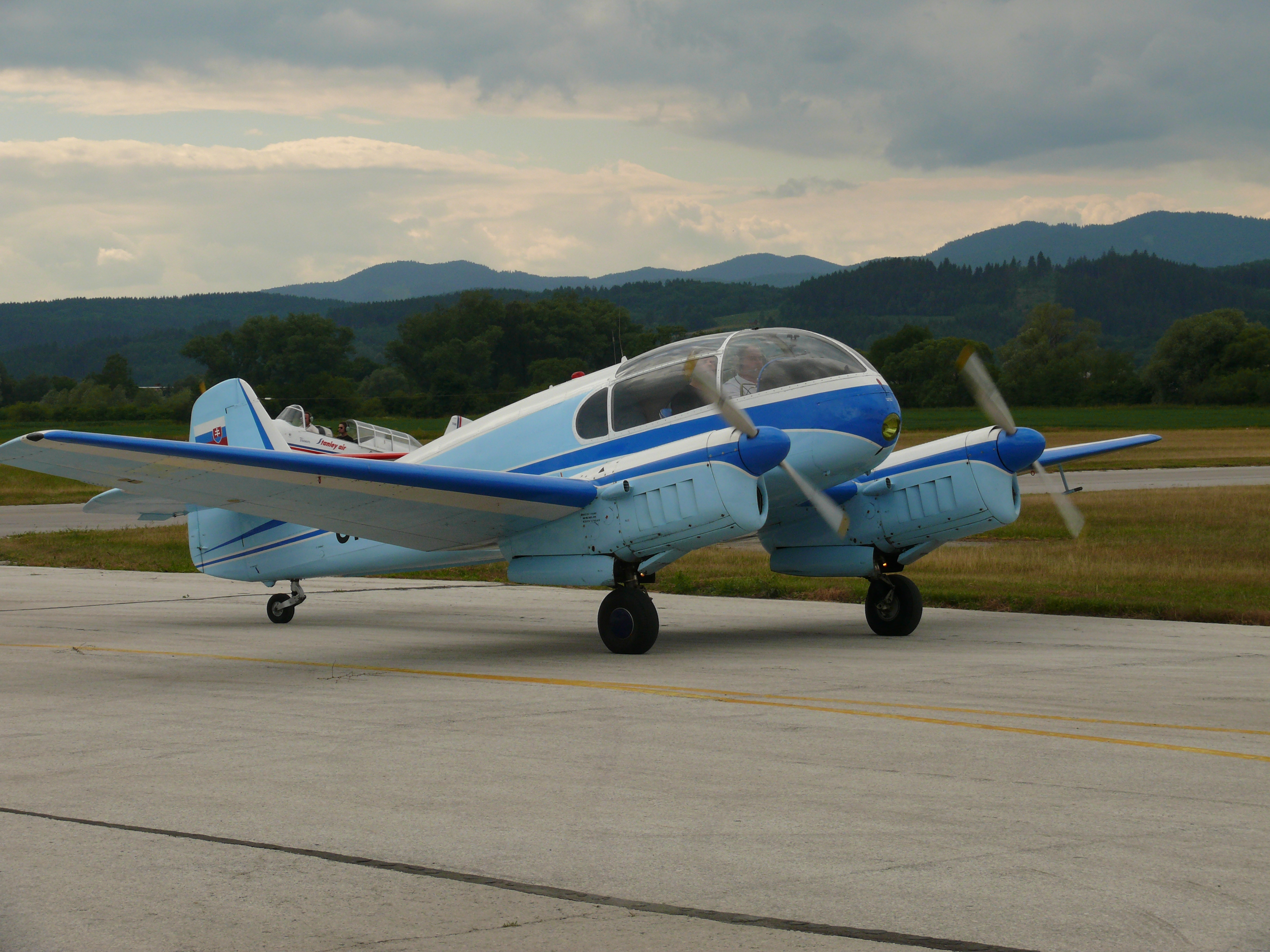 28.06.2008 - Medzinárodný letecký deň pri príležitosti 55. výročia založenia Žilinskej Univerzity a 90. výročia vzniku československého letectva.